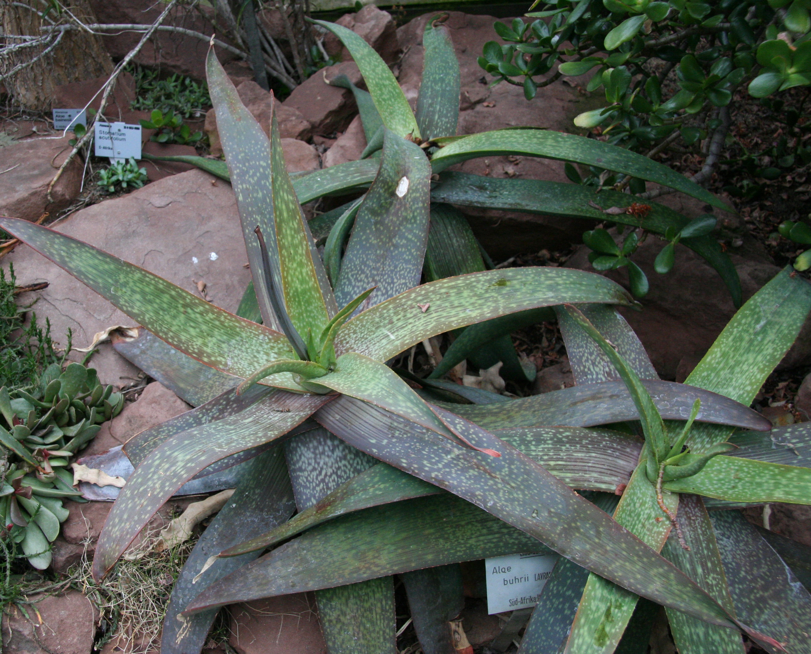 Aloe buhrii im Botanischen Garten Köln